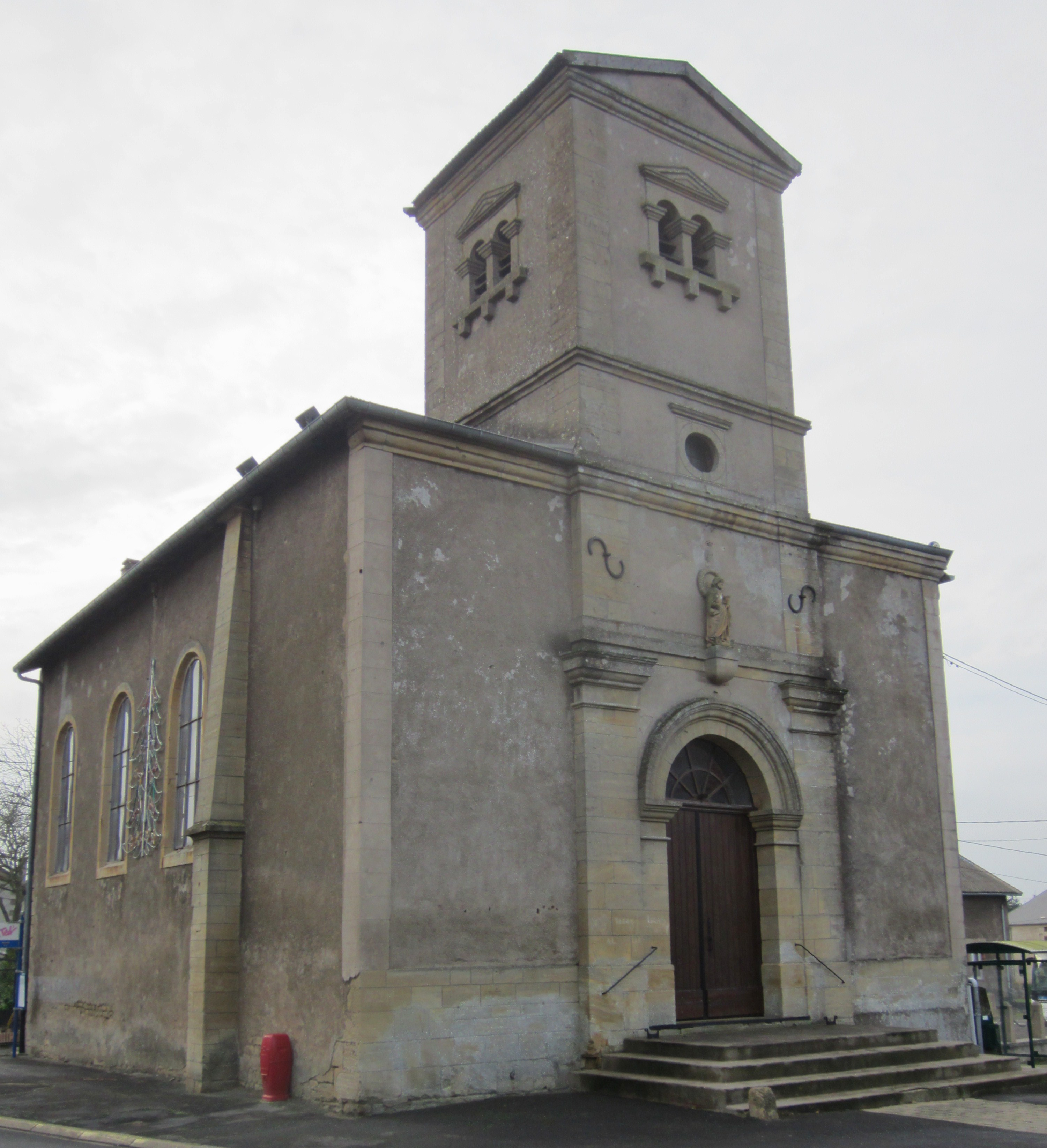 Description eglise Murville eglise Murville